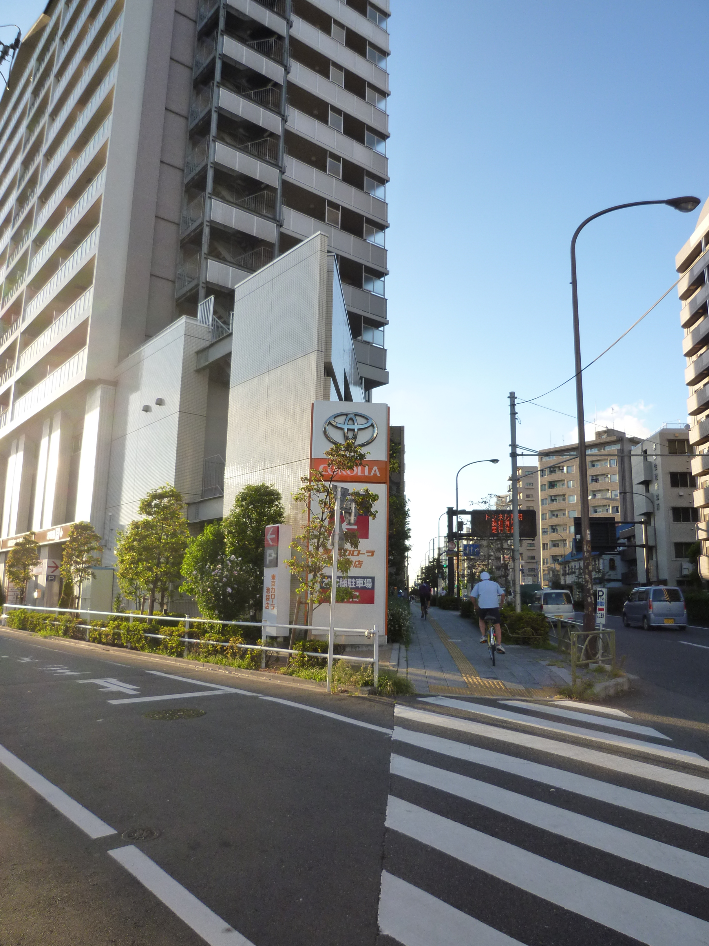 中丸町川越街道